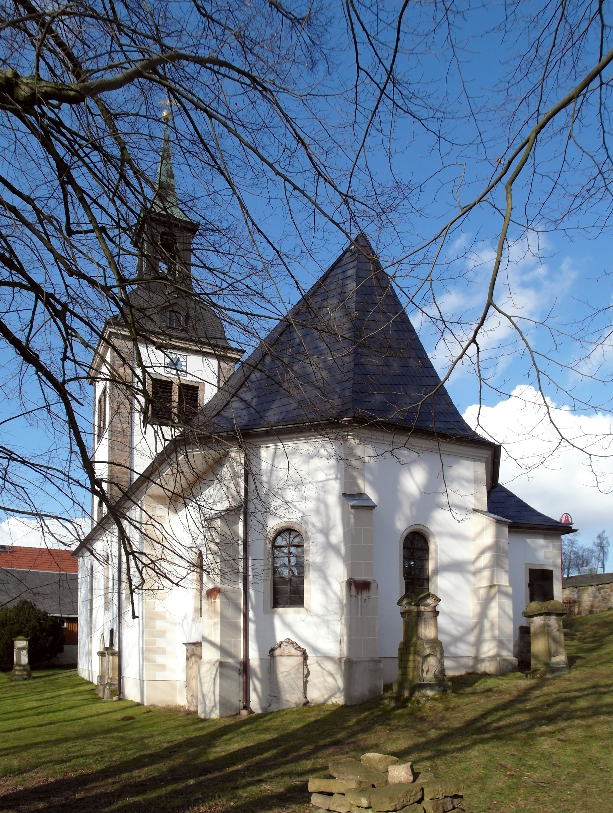 13.02.2018 01833 Dittersbach (Dürrröhrsdorf-Dittersbach), Hauptstraße 111: (GMP: 51.036563,13.988027) Evangelische Kirche. Nach dem Brand von 1660 wurde die 1662 heutige Kirche errichtet. Der Kirchturm wurde erst 1722 fertig. Innen eine Orgel von Gottfried Silbermann aus dem Jahre 1726. Sicht von Osten. [SAM3960.JPG]20180313330DR.JPG(c)Blobelt